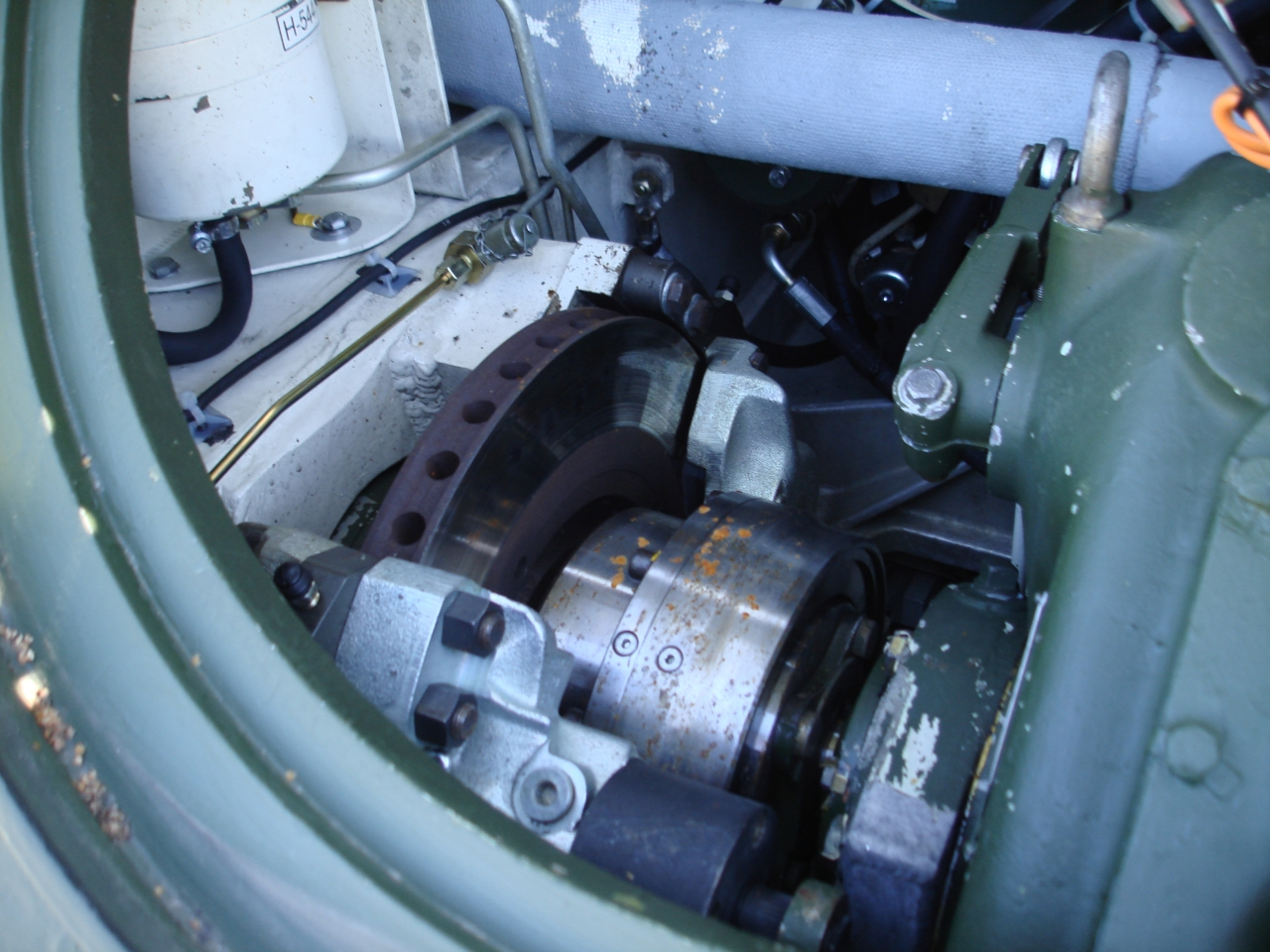 Rechte Seite des Triebwerksraum eines deutschen M113 mit NDV1. Es zeigt die neue Bremsscheibe und die nötige Bogenzahnkupplung.